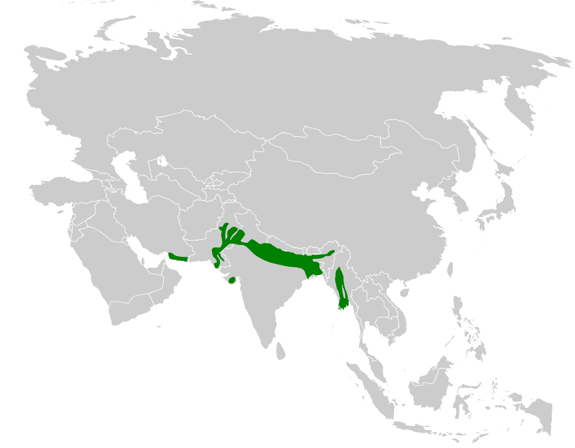 Calandrella raytal distribution map, based on